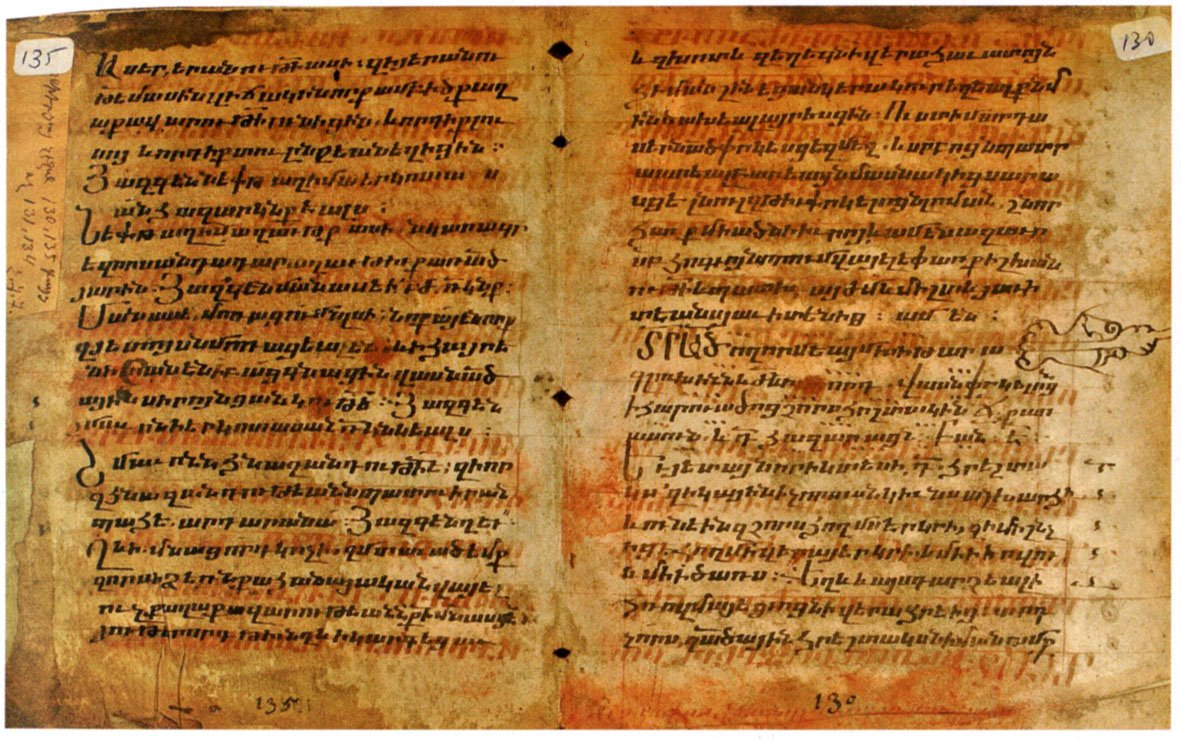 Палимпсест с текстом «Истории» Агатангехоса